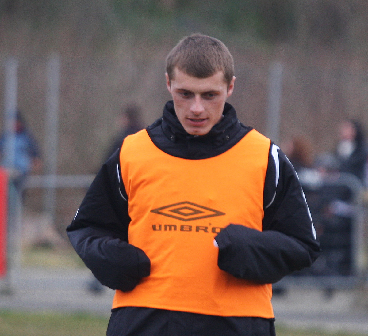 Faton Zahiri, Sarpsborg